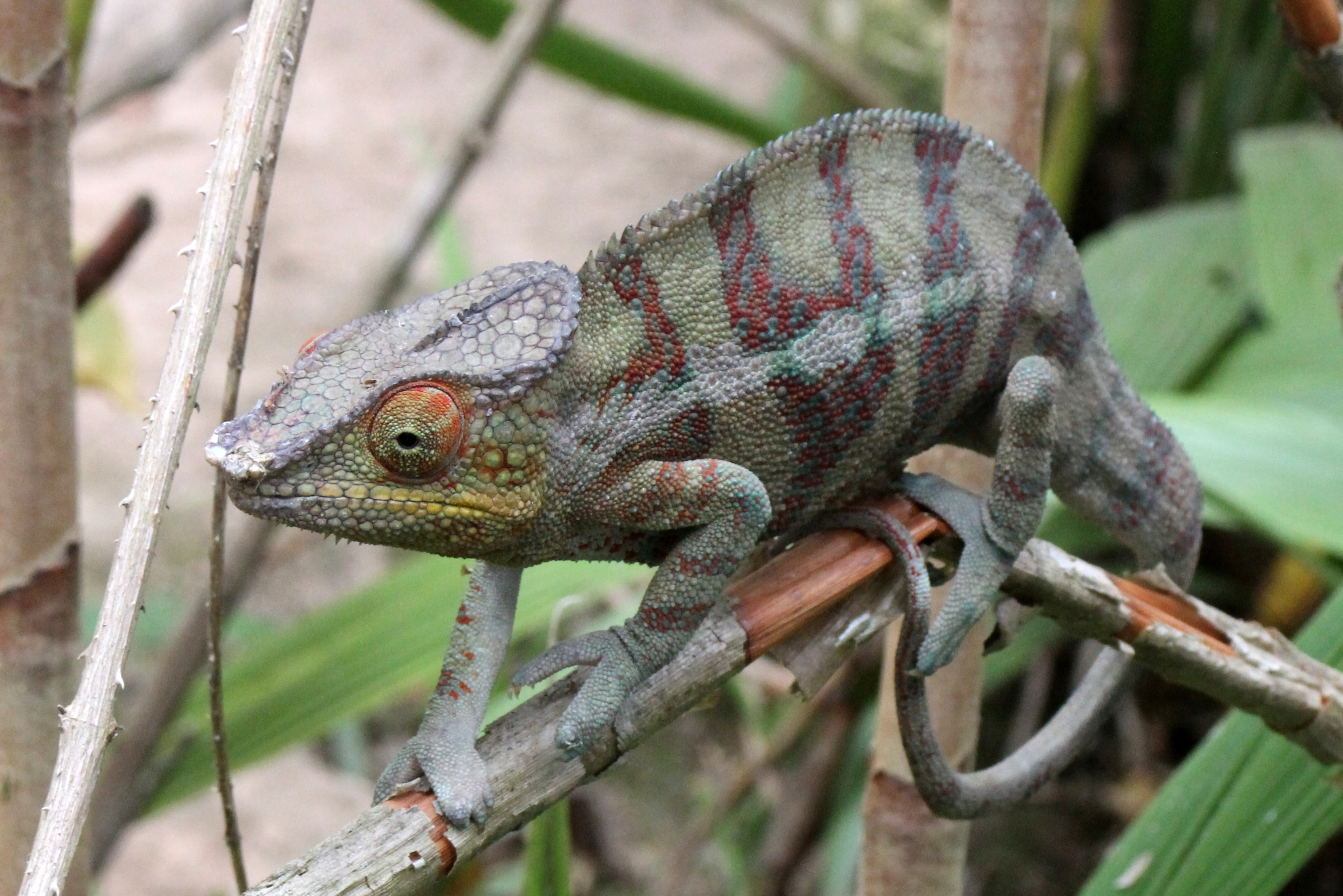 cameleon, peyrieras